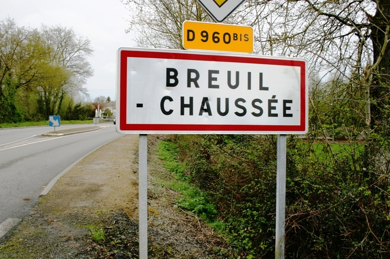 Français